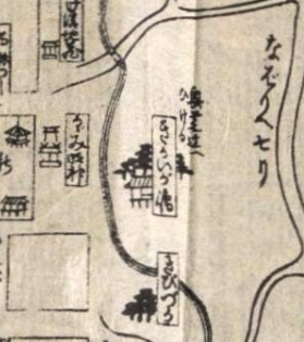 鬼界ヶ島 - 天保15[1844] 和州奈良之図